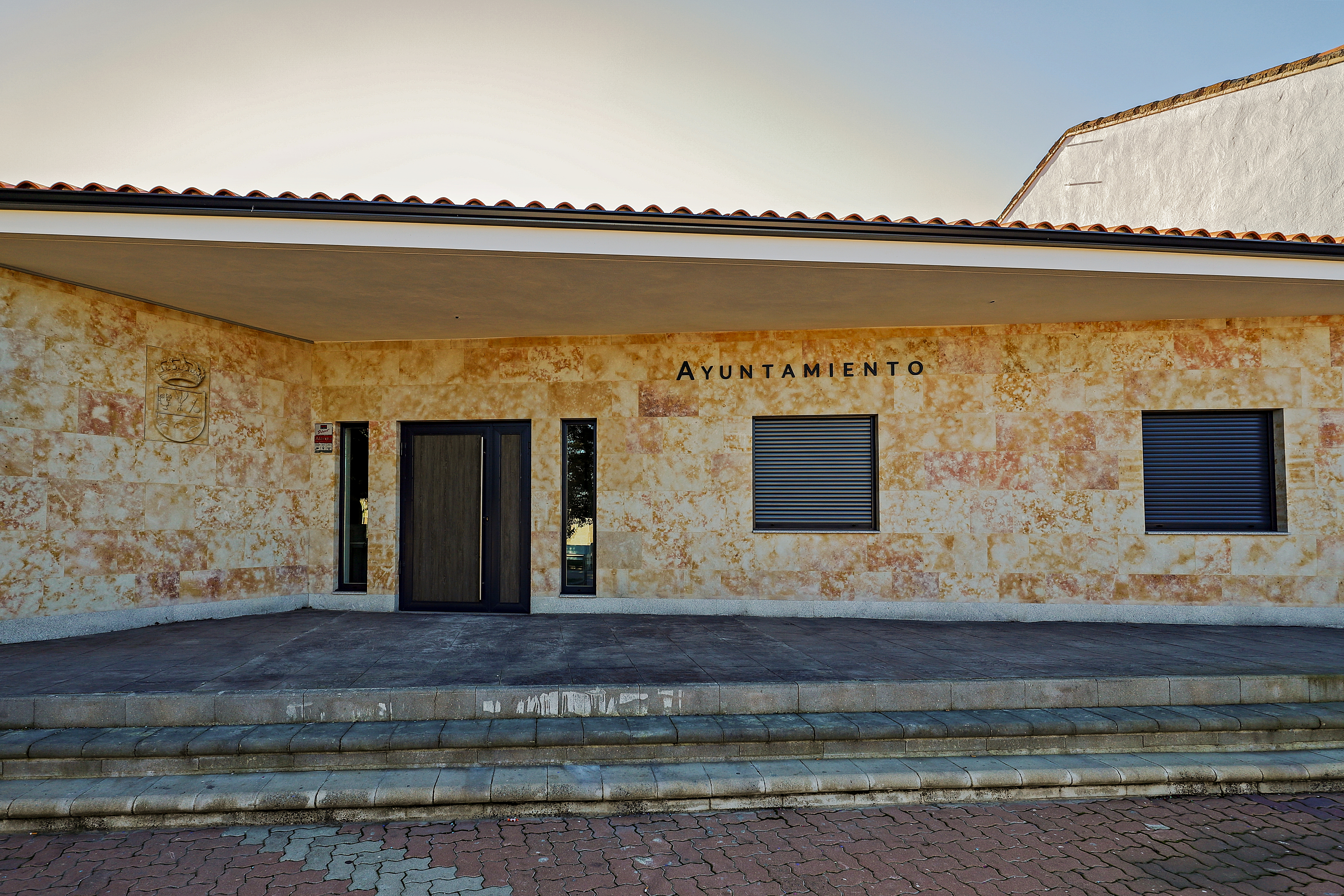 Espino de la Orbada, municipio de la comarca de La Armuña, provincia de Salamanca.